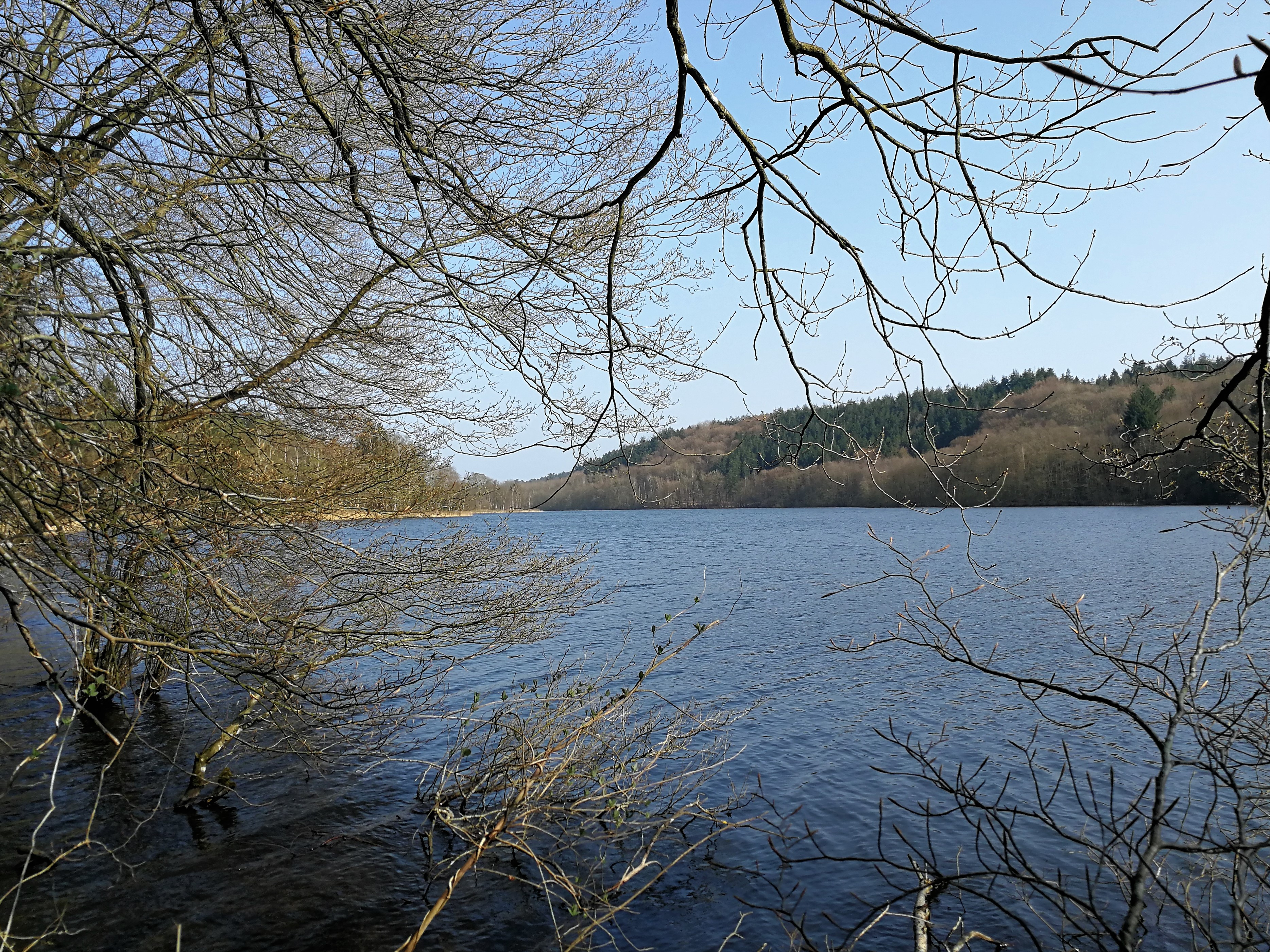 Thorsø set mod øst